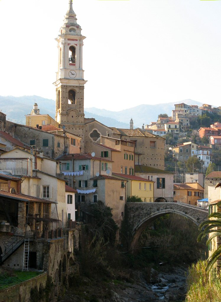 Dolcedo, Imperia, Italy